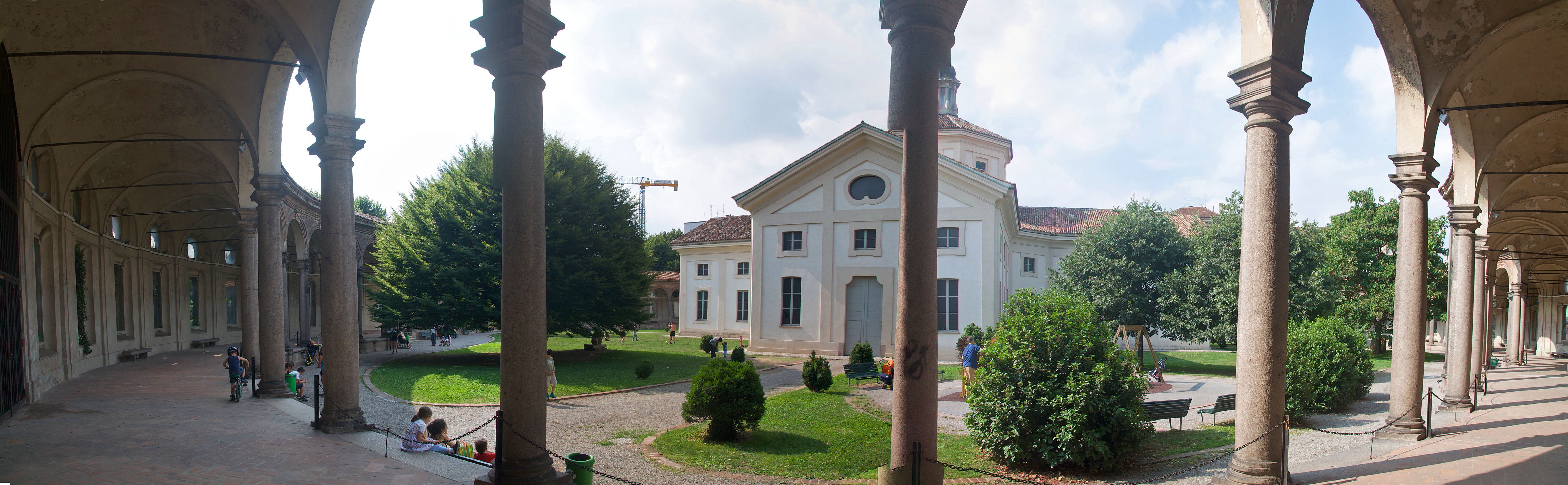 Photomerge Rotonda della Besana, Milan